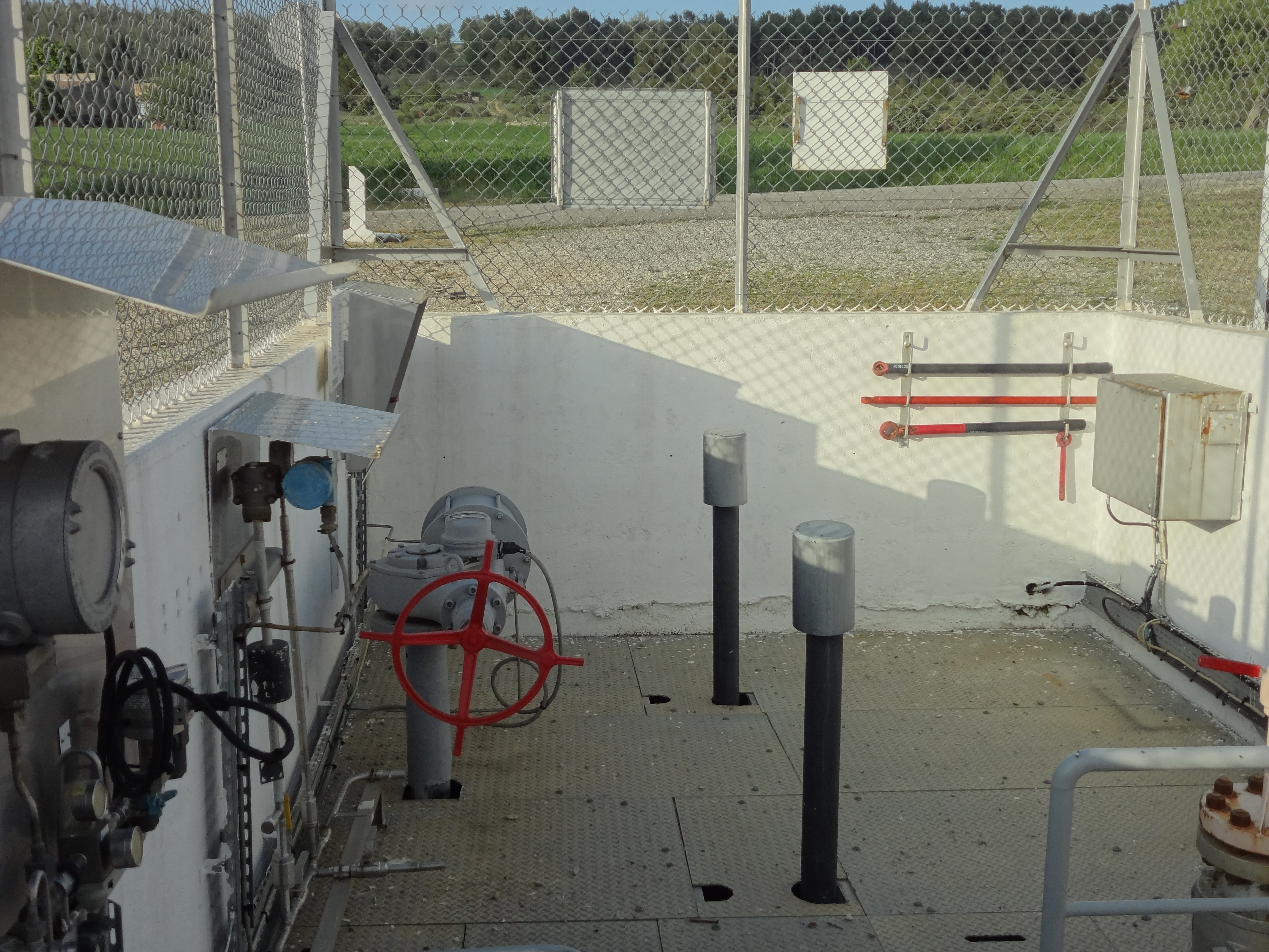 Poste sur le pipeline Transéthylène